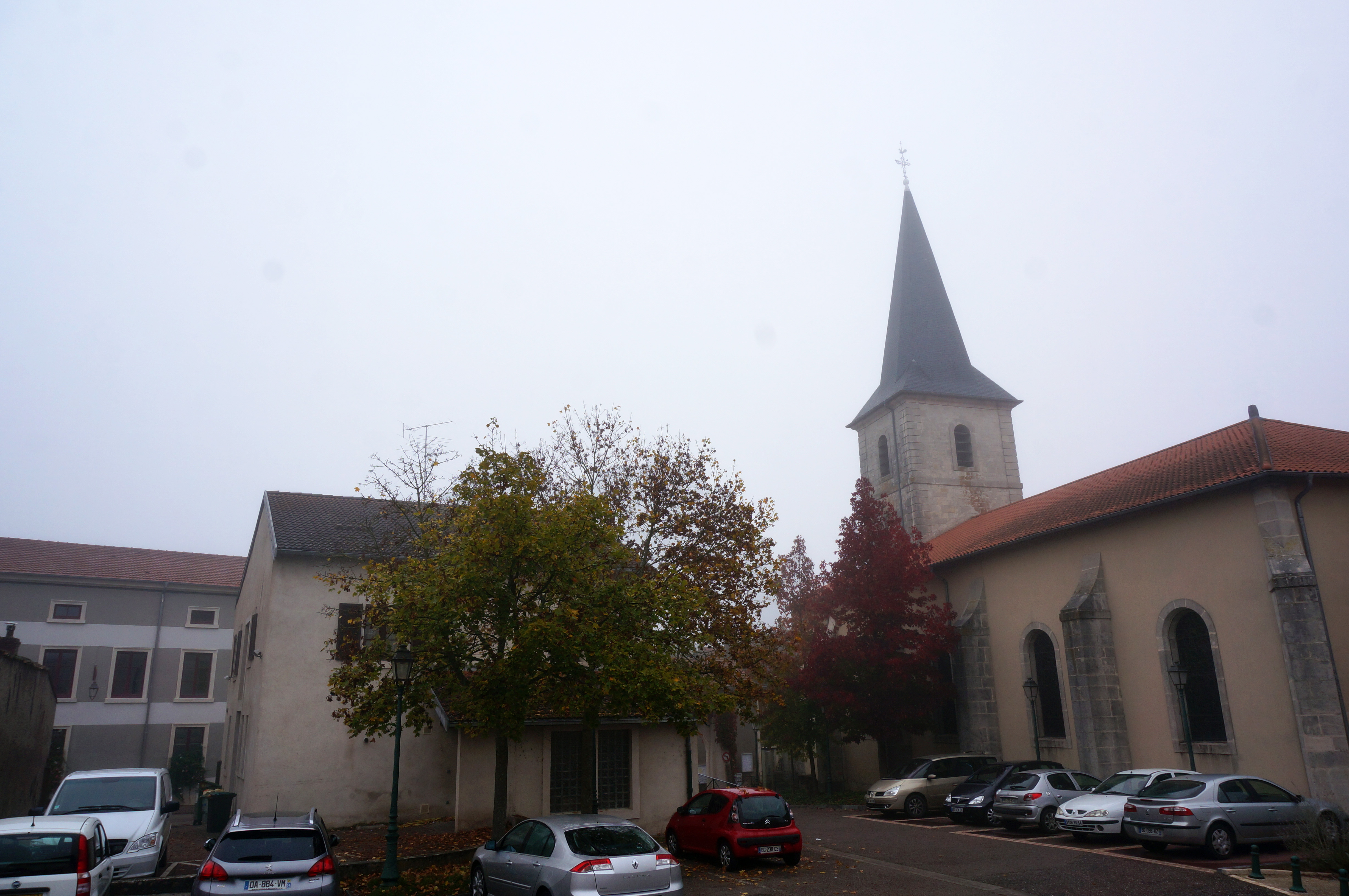 à GOndreville.